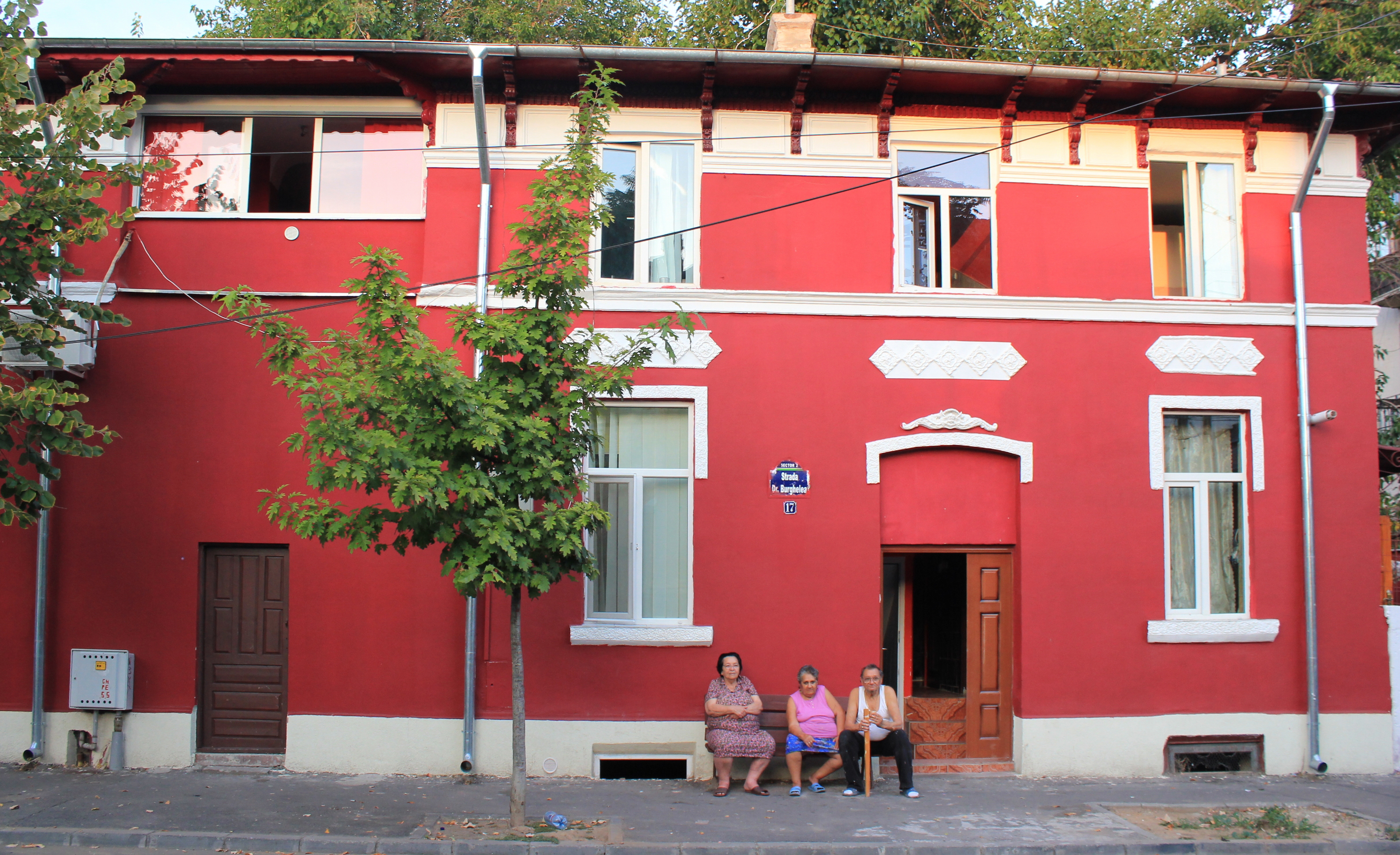 Casă Burghelea 17